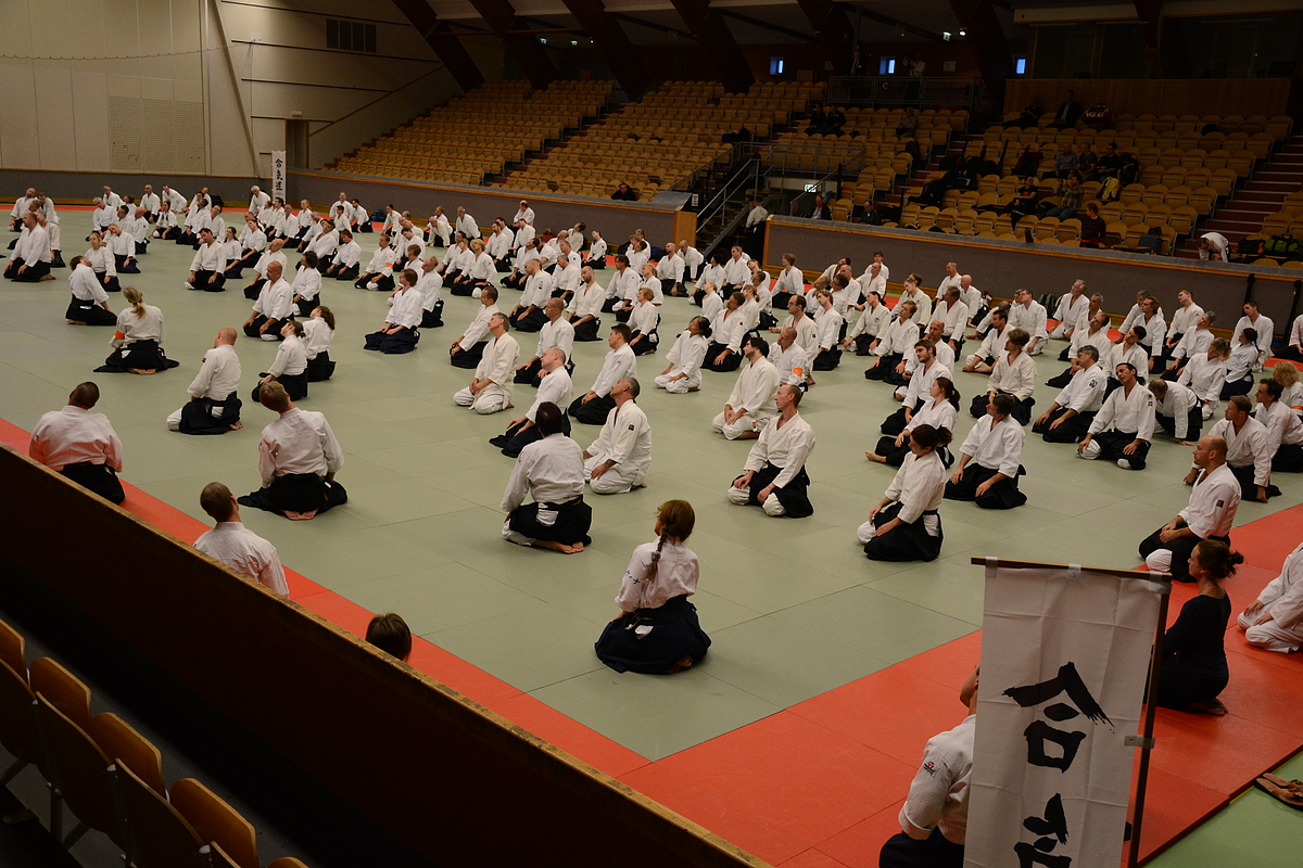 Träningsläger Jubileum Aikido 50 år i Sverige